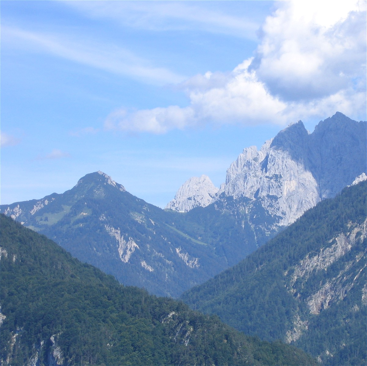 Stripsenkopf (links) im Kaisergebirge